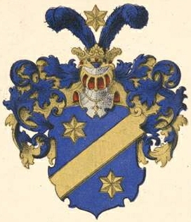 Sengbuschi suguvõsa aadlivapp